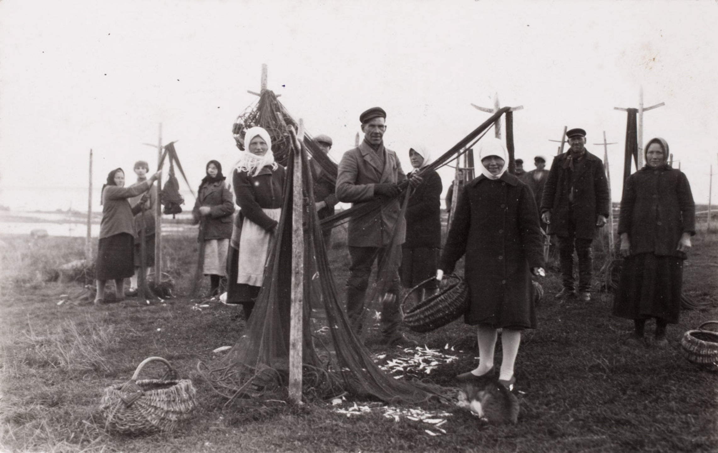 Räimevõrkude tühjendamine 1929. aastal Abruka saarel Vesiaia rannas